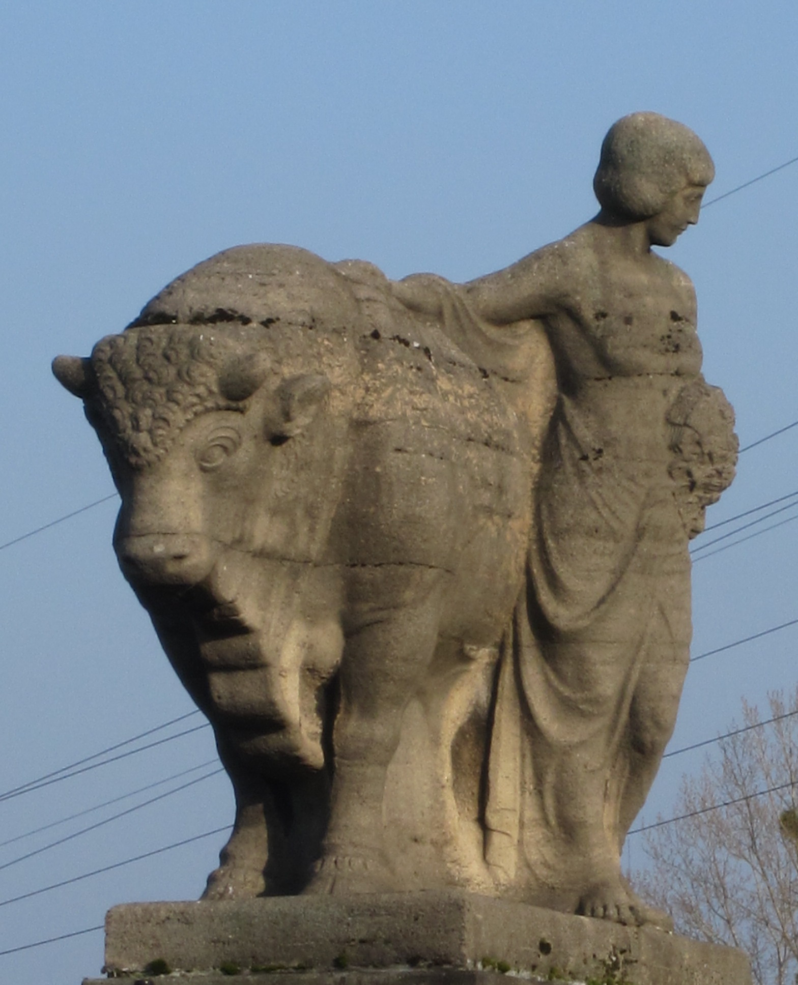 Figur aus dem Figurenzyklus auf der Ochsenbrücke/Eschholzbrücke, Freiburg, 1912 (Brückenbau und Entwurf, Ausführung Ludwig Kubanek). Die Figuren stehen heute senkrecht zur Fahrtrichtung der Eschholzstraße. Ursprünglich standen sie parallel zur Fahrtrichtung. Im Rahmen des Umbaus der Brücke wurden die Figuren gedreht.